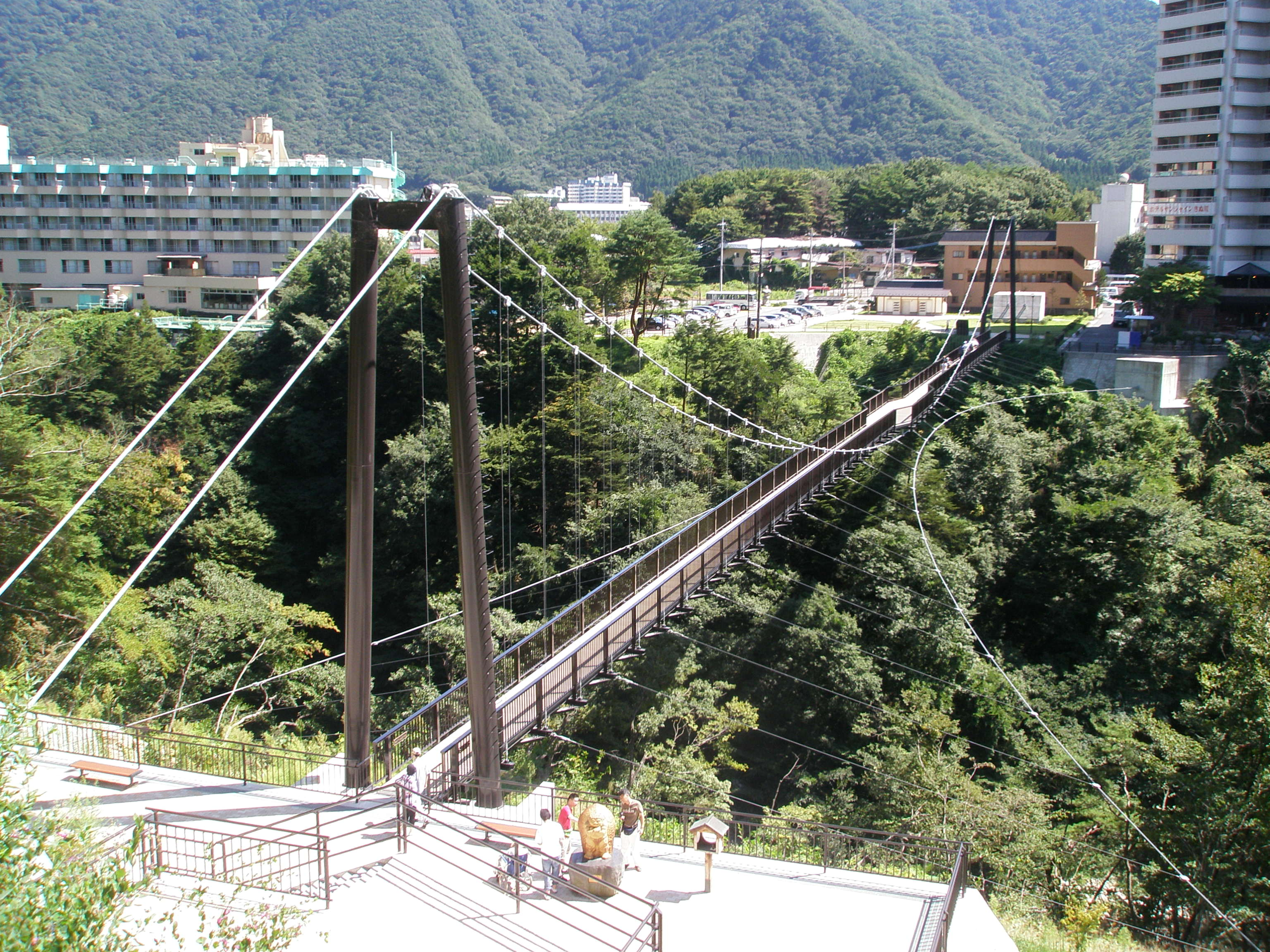 鬼怒楯岩大吊橋（きぬたていわおおつりばし）。栃木県日光市（藤原地区）の鬼怒川に架かる歩行者専用の吊り橋である。全長140m、2009年7月19日開通。